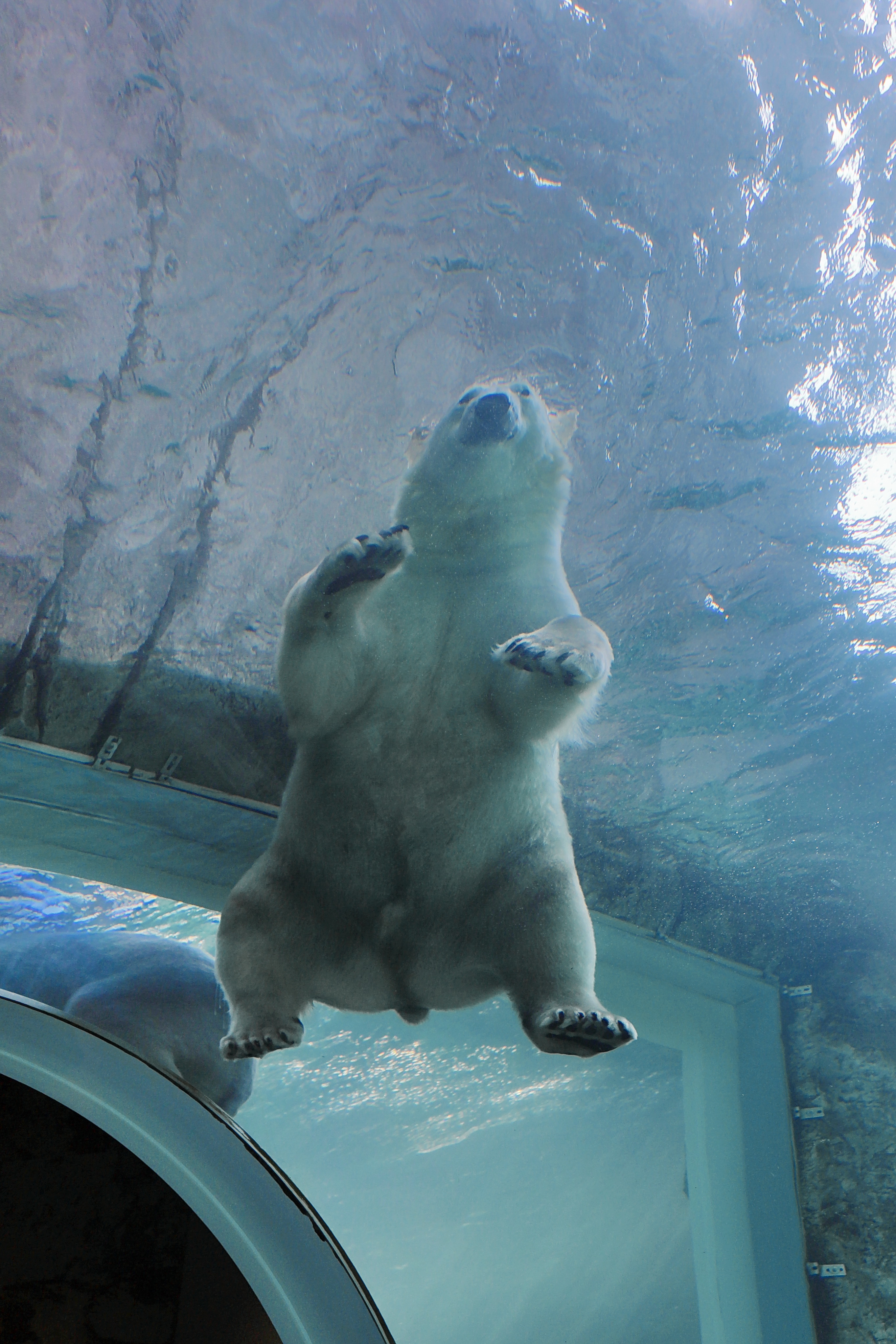 Assiniboine Park Zoo, Winnipeg, Manitoba, Canada